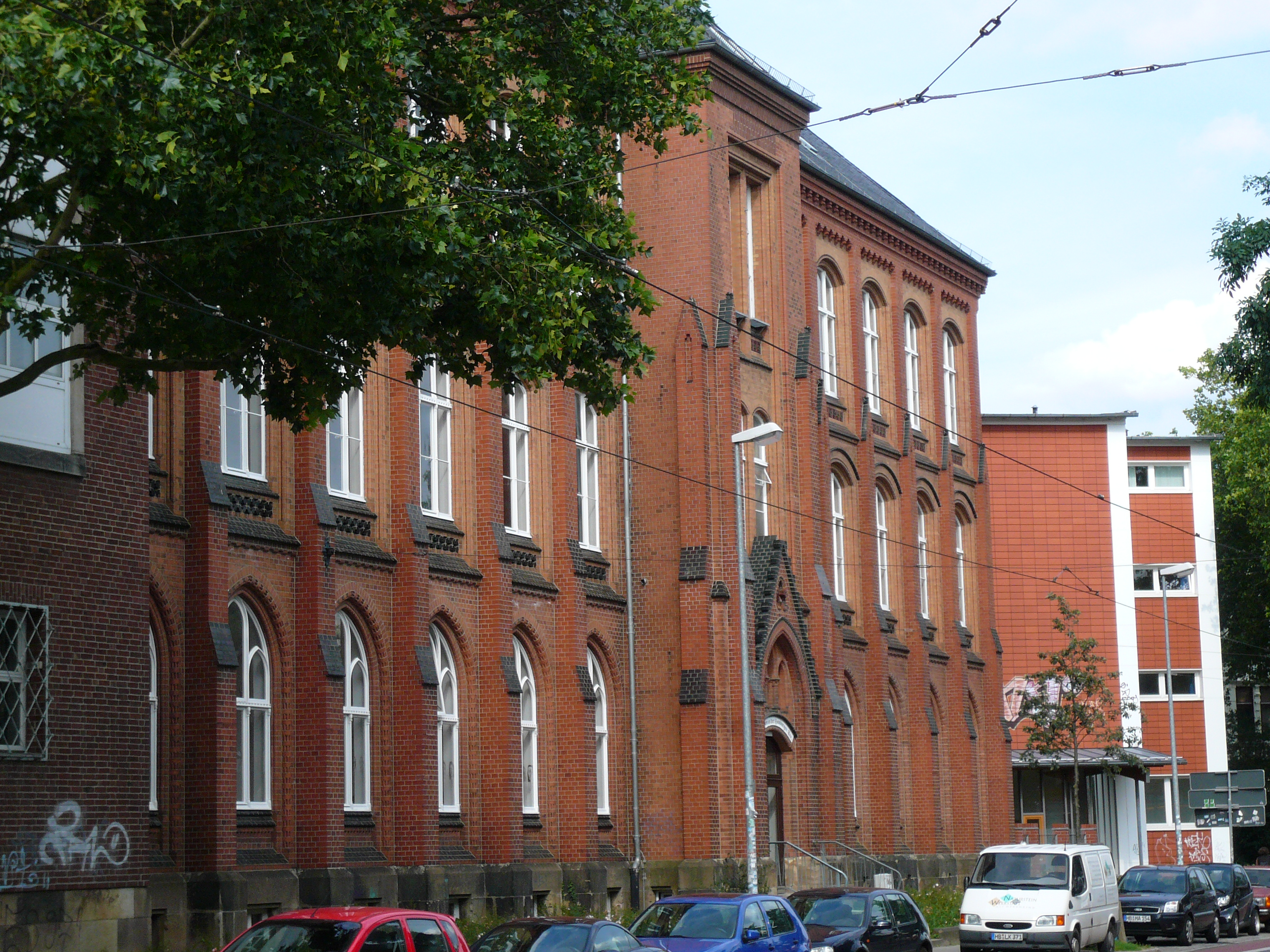 Das Gymnasium an der Hamburger Straße in Bremen. Das abgebildete Objekt ist ein geschütztes Kulturdenkmal in der Freien Hansestadt Bremen, mit der Nr. 0471 beim Landesamt für Denkmalpflege registriert.